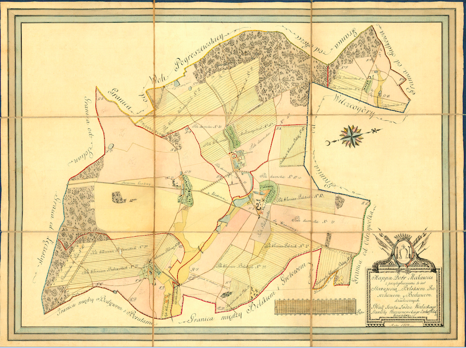 Plan majątku w Małej Wsi z XIX wieku